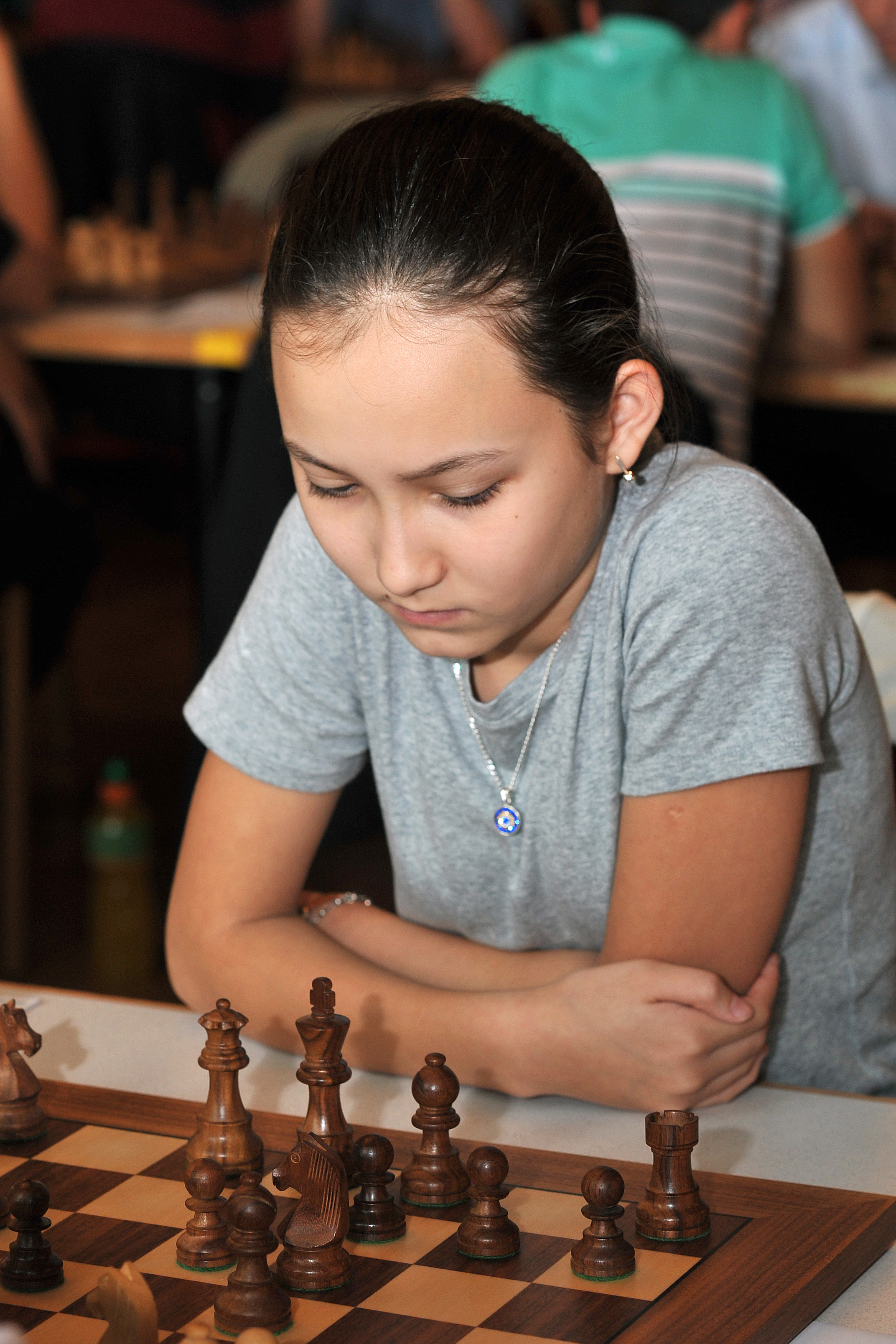 Vienna Chess Open 2013, A-Turnier: 8. Runde am 24. August 2013 - WIM Zhansaya Abdumalik